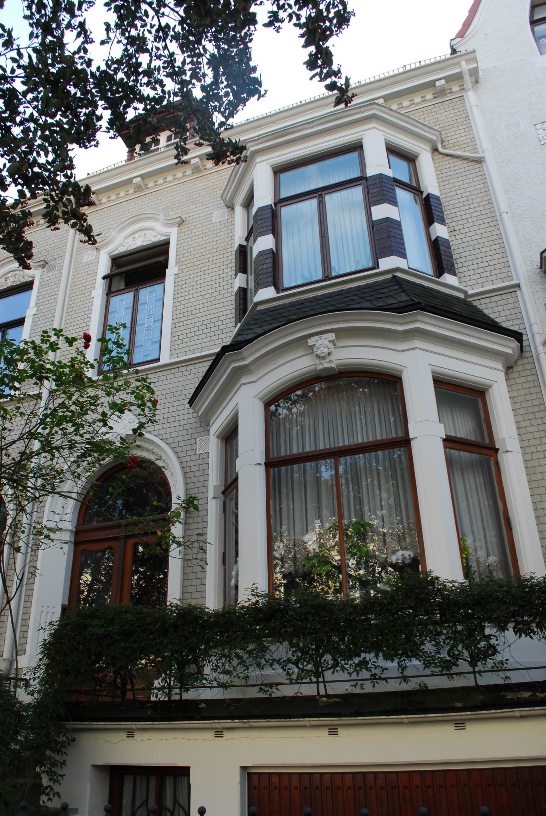 Haus Pappier in Bremen, Goebenstraße 10.Das abgebildete Objekt ist ein geschütztes Kulturdenkmal in der Freien Hansestadt Bremen, mit der Nr. 0435 beim Landesamt für Denkmalpflege registriert.